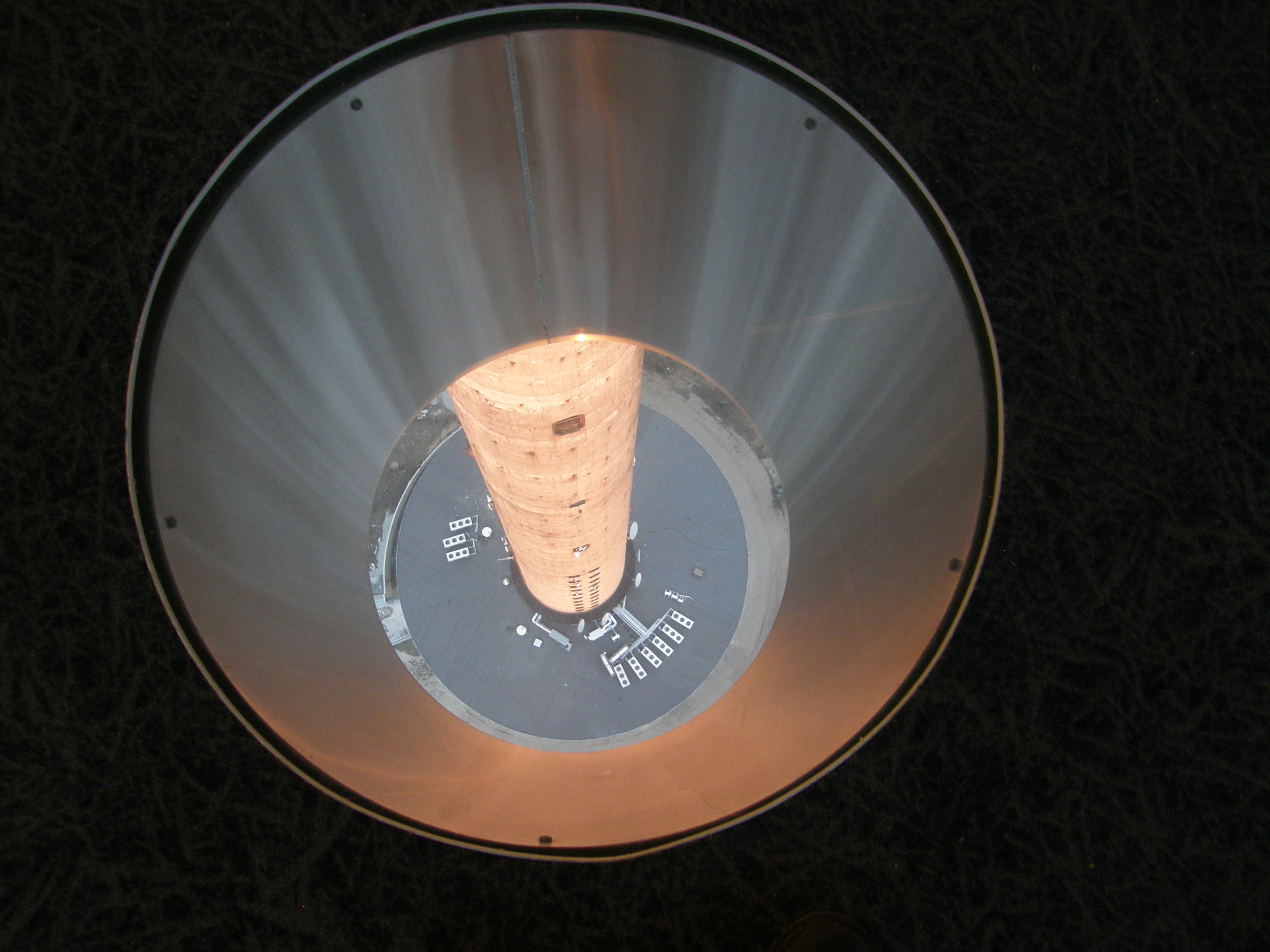 Vaade 21. korruse klaasist põrandaaknast.